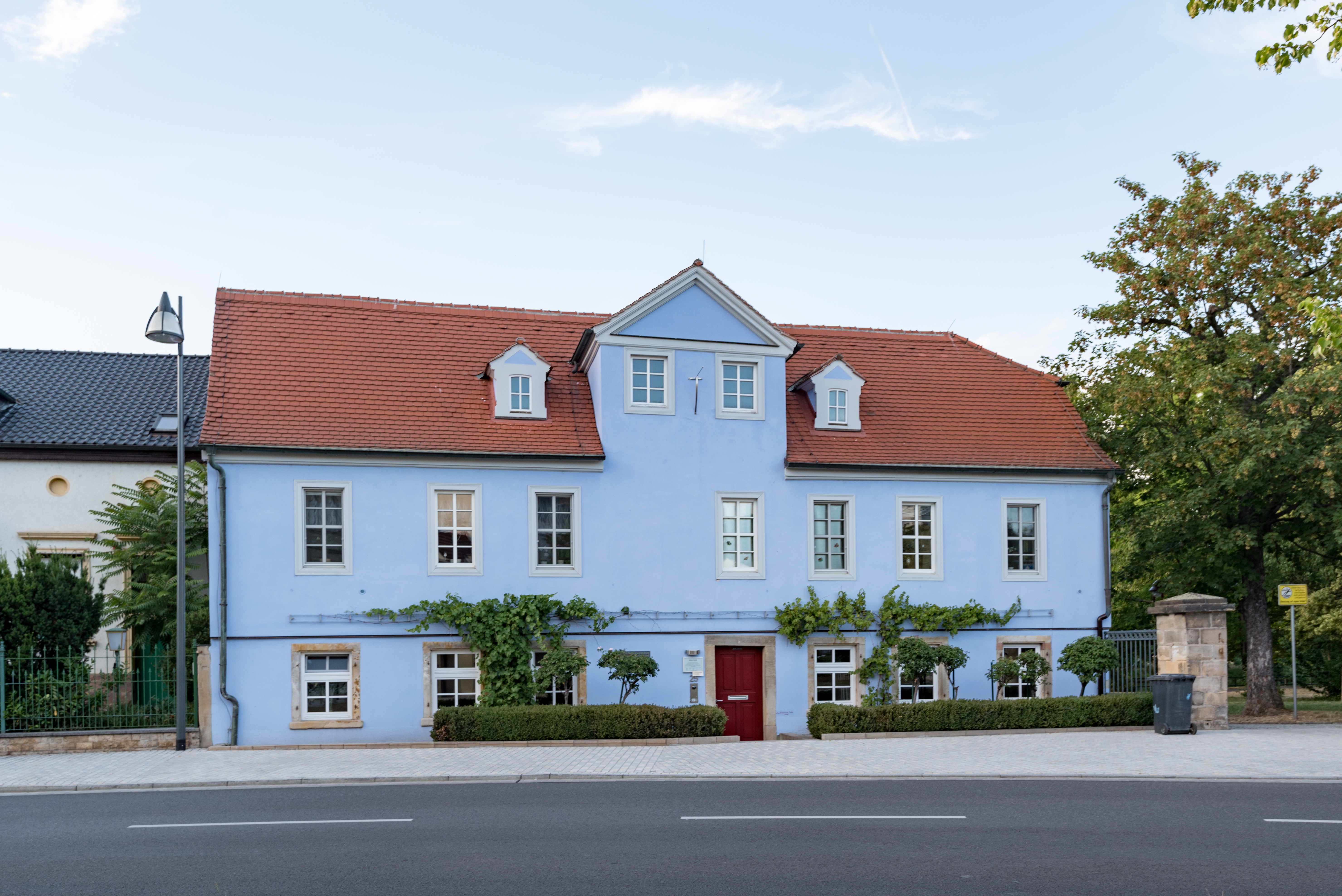 Weißenfels, Promenade 25